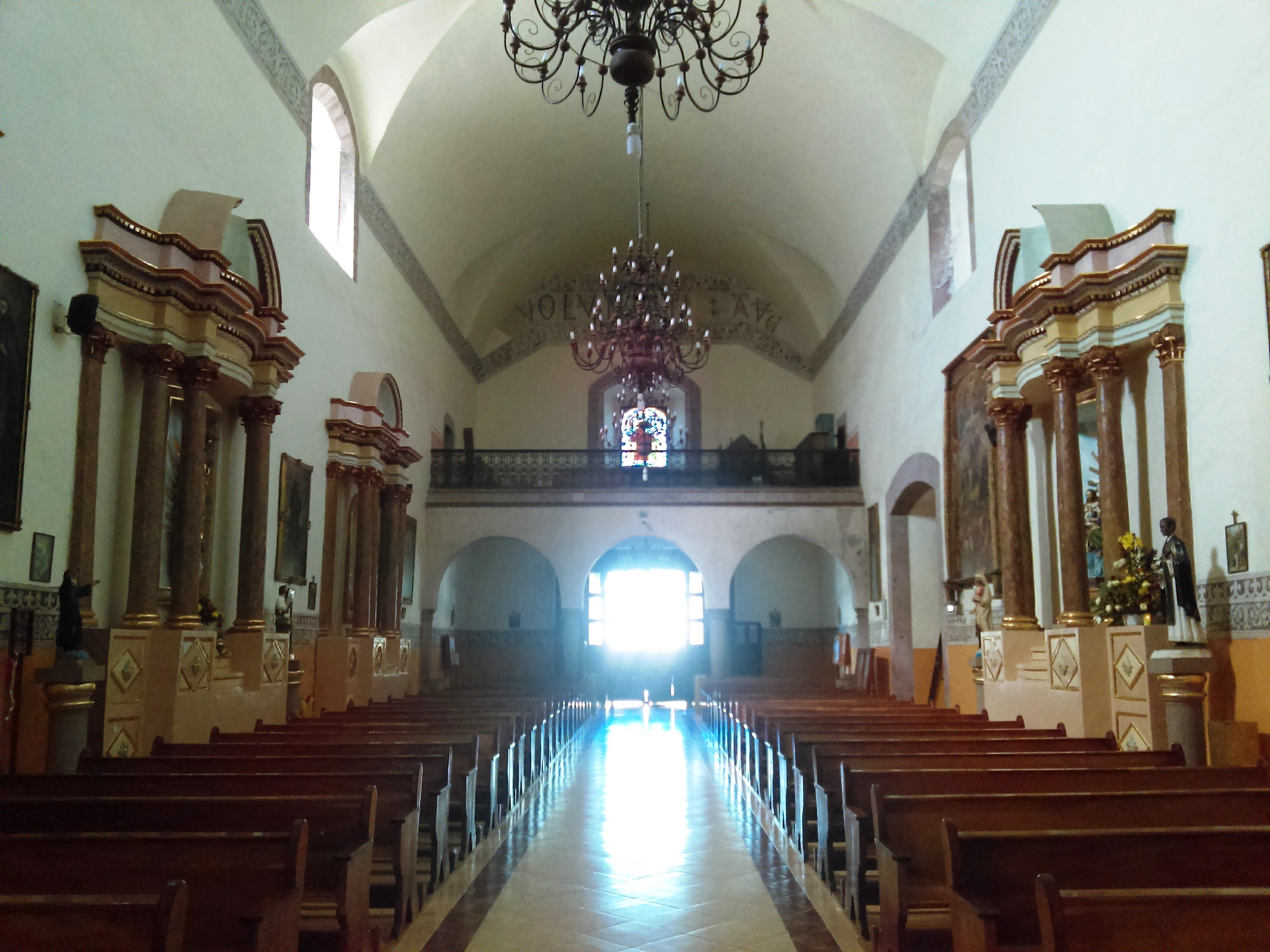 Templo y exconvento de San Francisco en Tepeji del Río, Hidalgo (México).